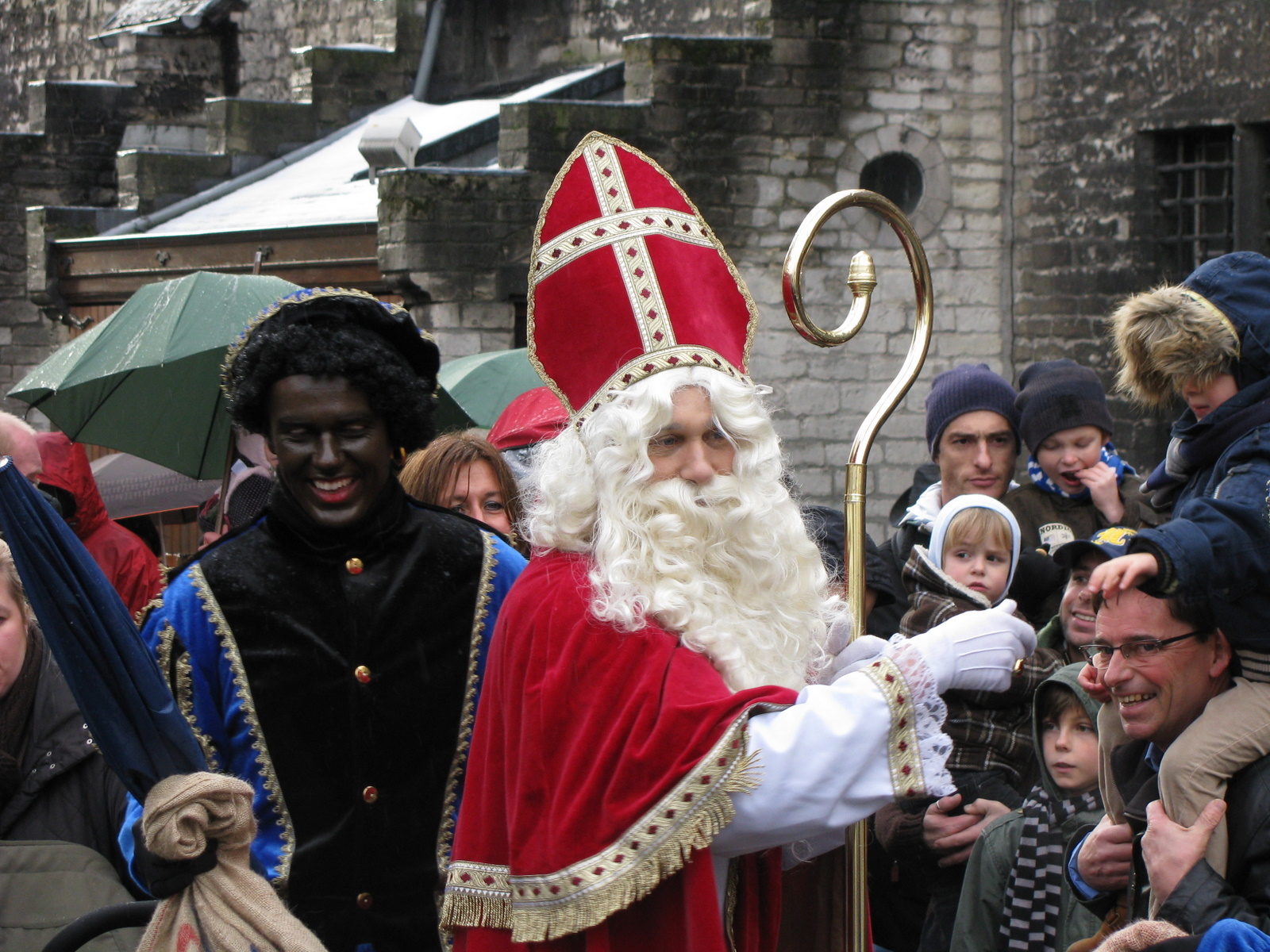 Ghent